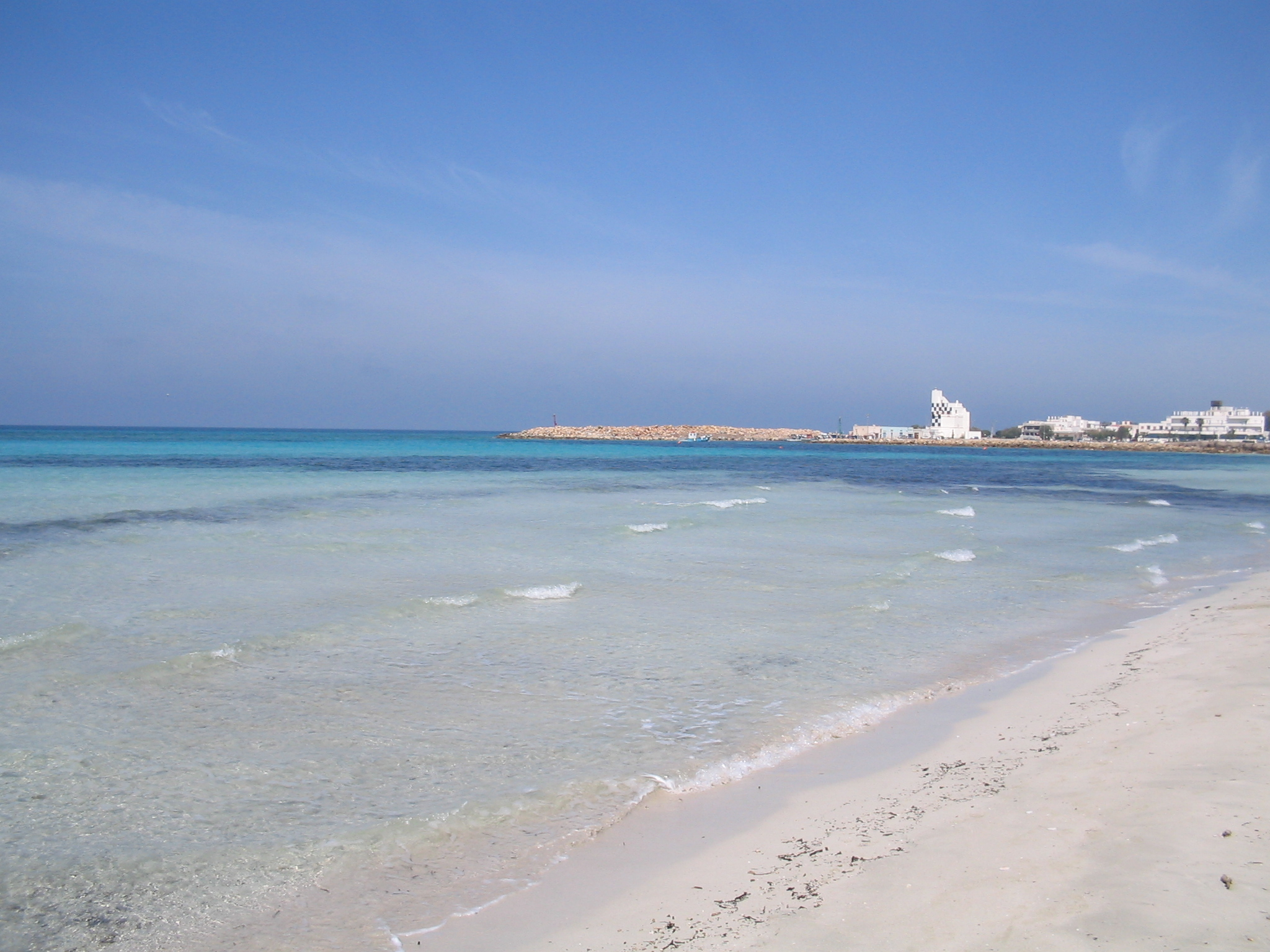 litorale sabbioso di Torre San Giovanni (Ugento) - provincia di Lecce